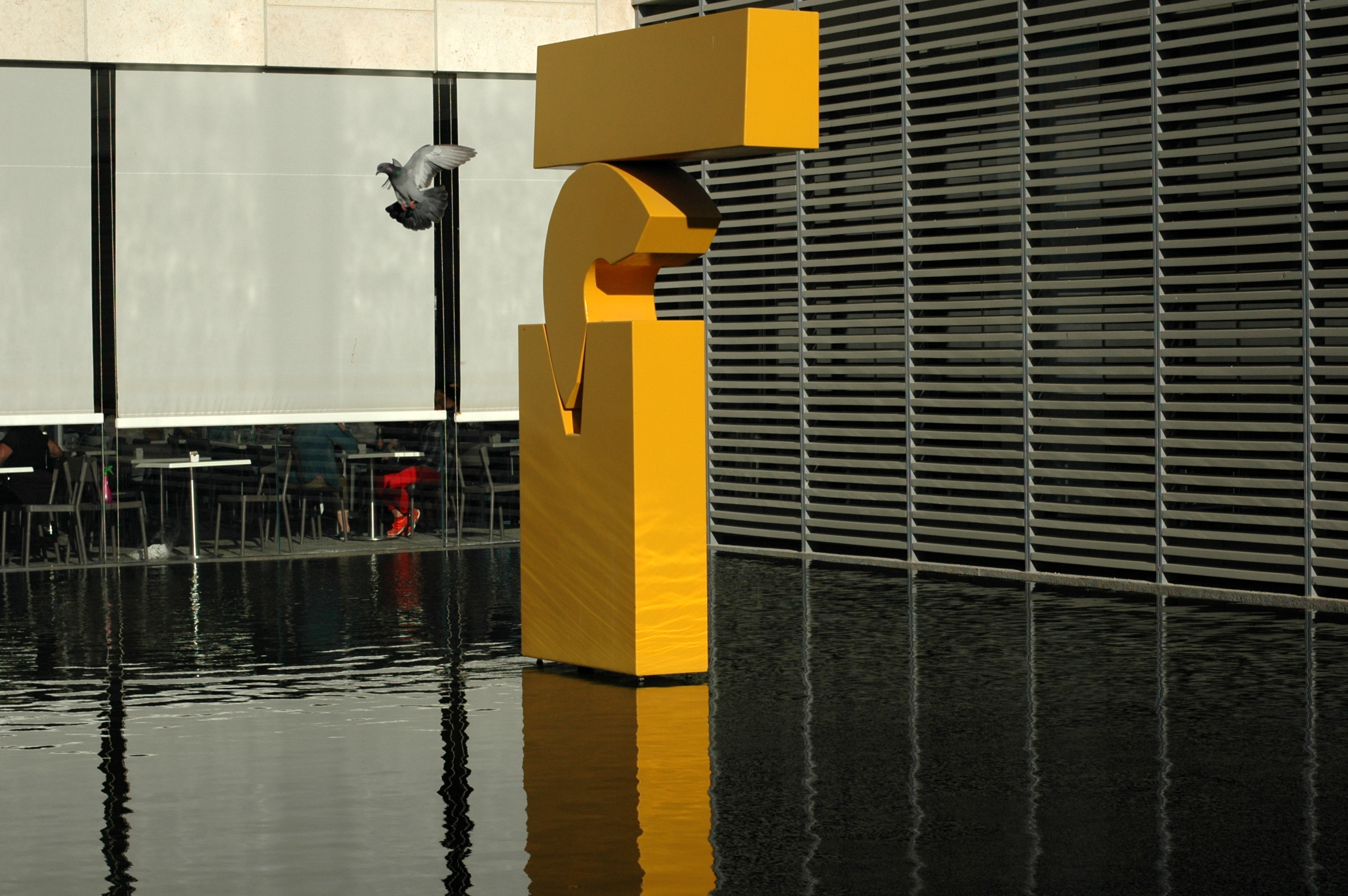 Sculpture